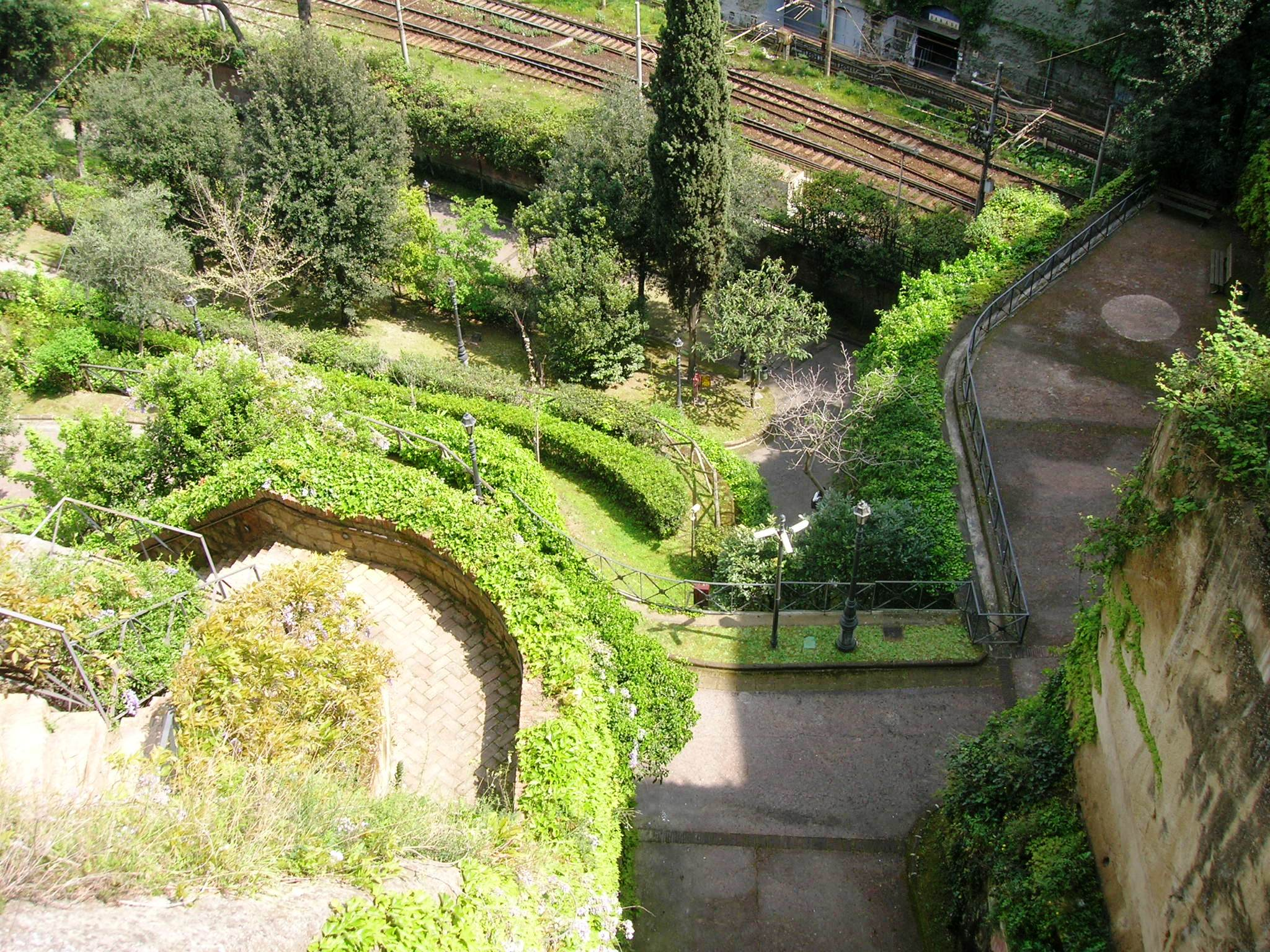 Parco Vergiliano a Piedigrotta